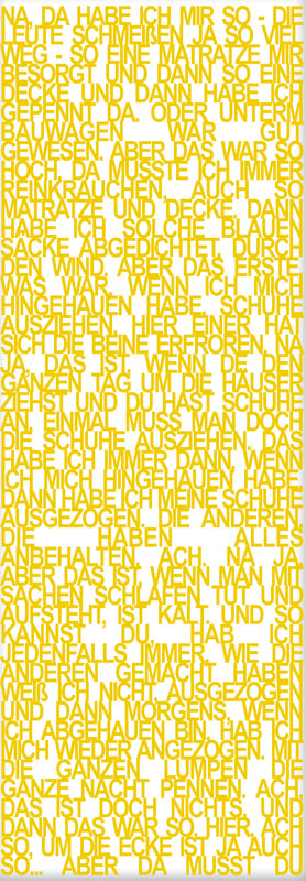 Portrait of Peter Scheller